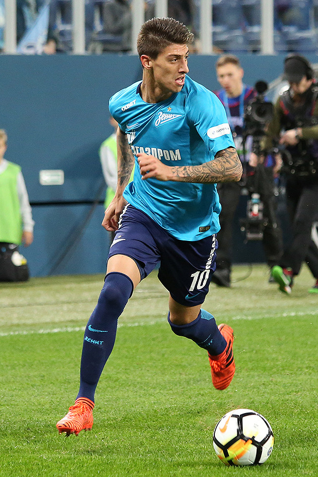 «Зенит» - «Локомотив»